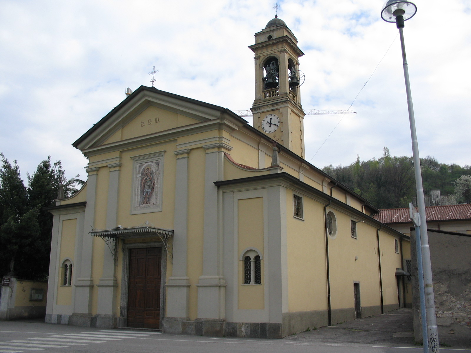 Autore Giorces. Robbiate, parrocchiale di S. Alessandro.